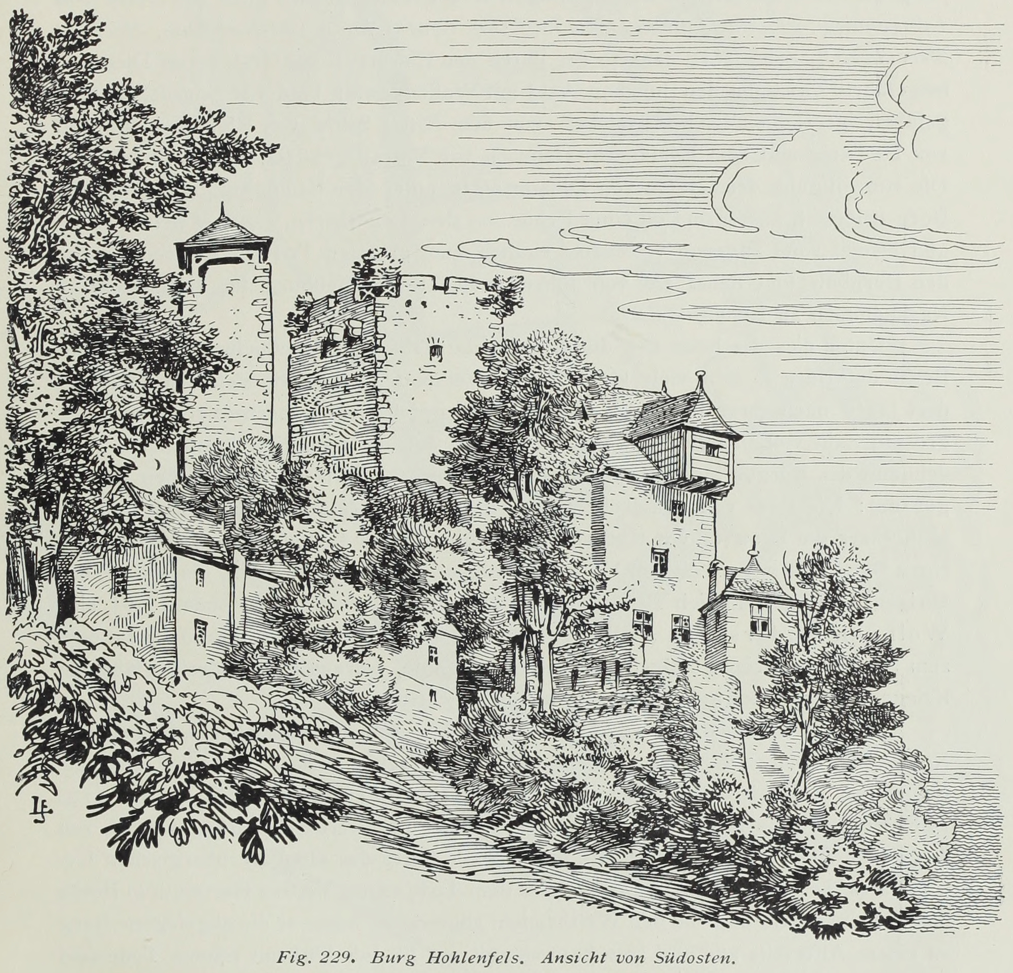 Burg Hohlenfels Ansicht von Südosten